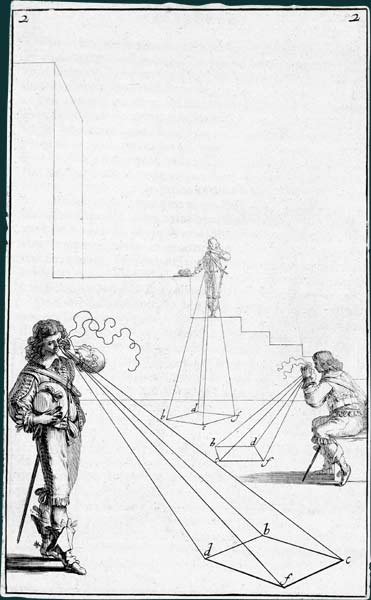 illustration par A. Bosse du traité de G. Désargues